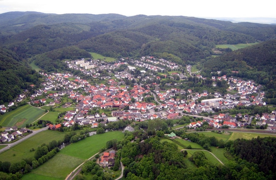 Luftaufnahme aus Süden auf den Ortsteil Buchenau